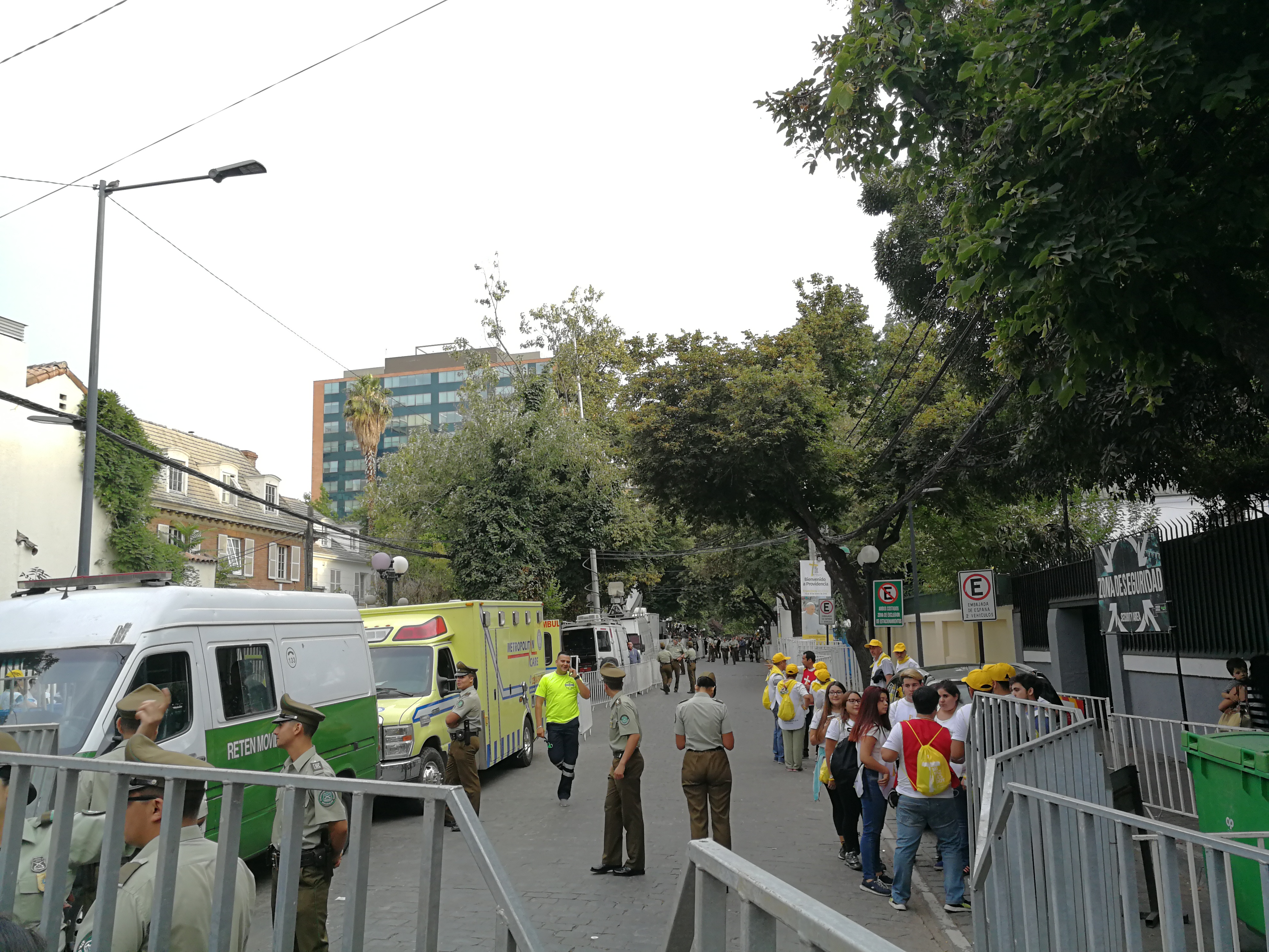 Preparación para la llegada del papa Francisco a la Nunciatura Apostólica, en Providencia, Santiago.